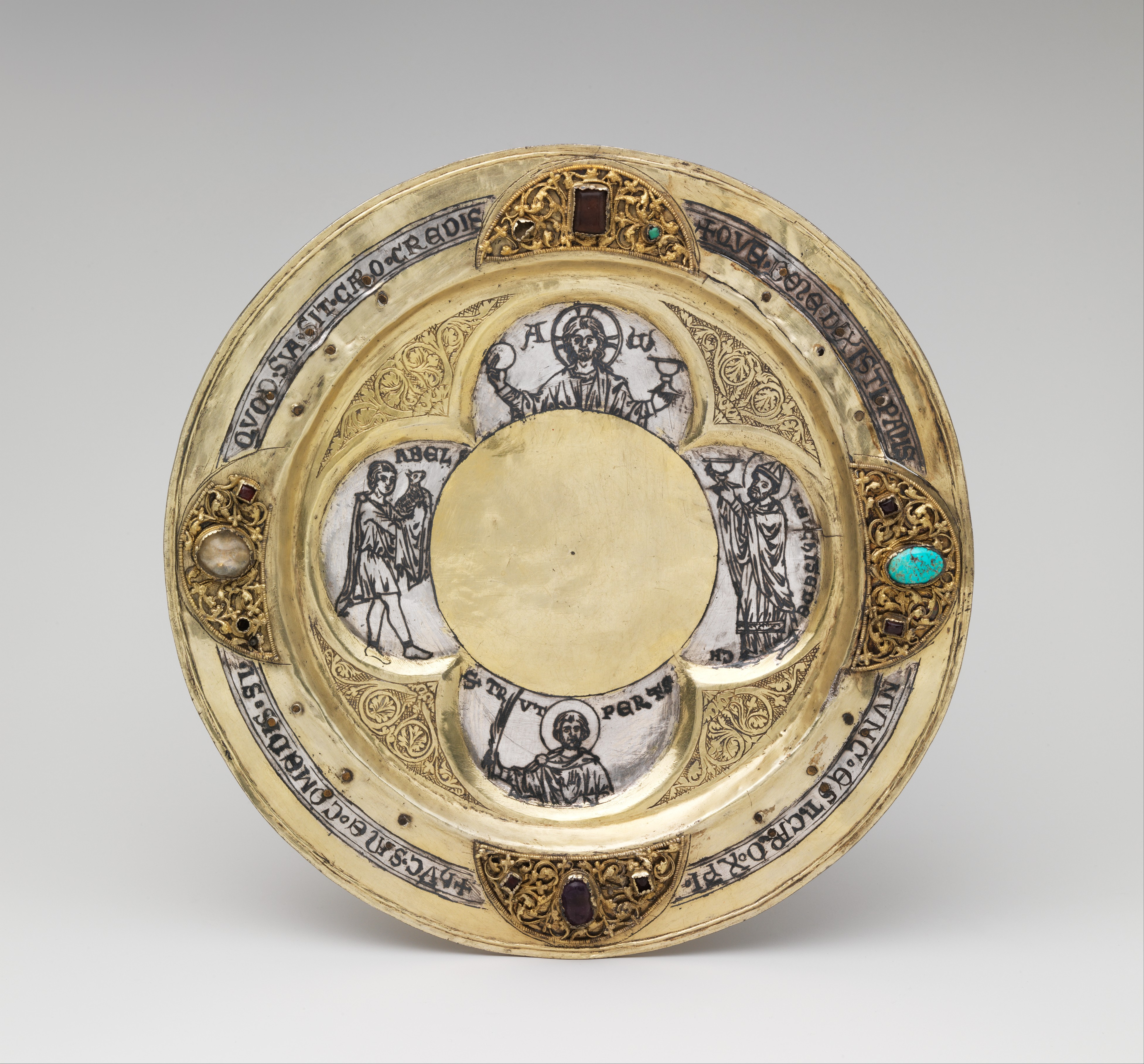 German; Paten; Metalwork-Silver